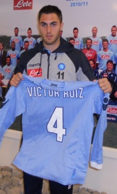 Presentazione di Victor Ruiz